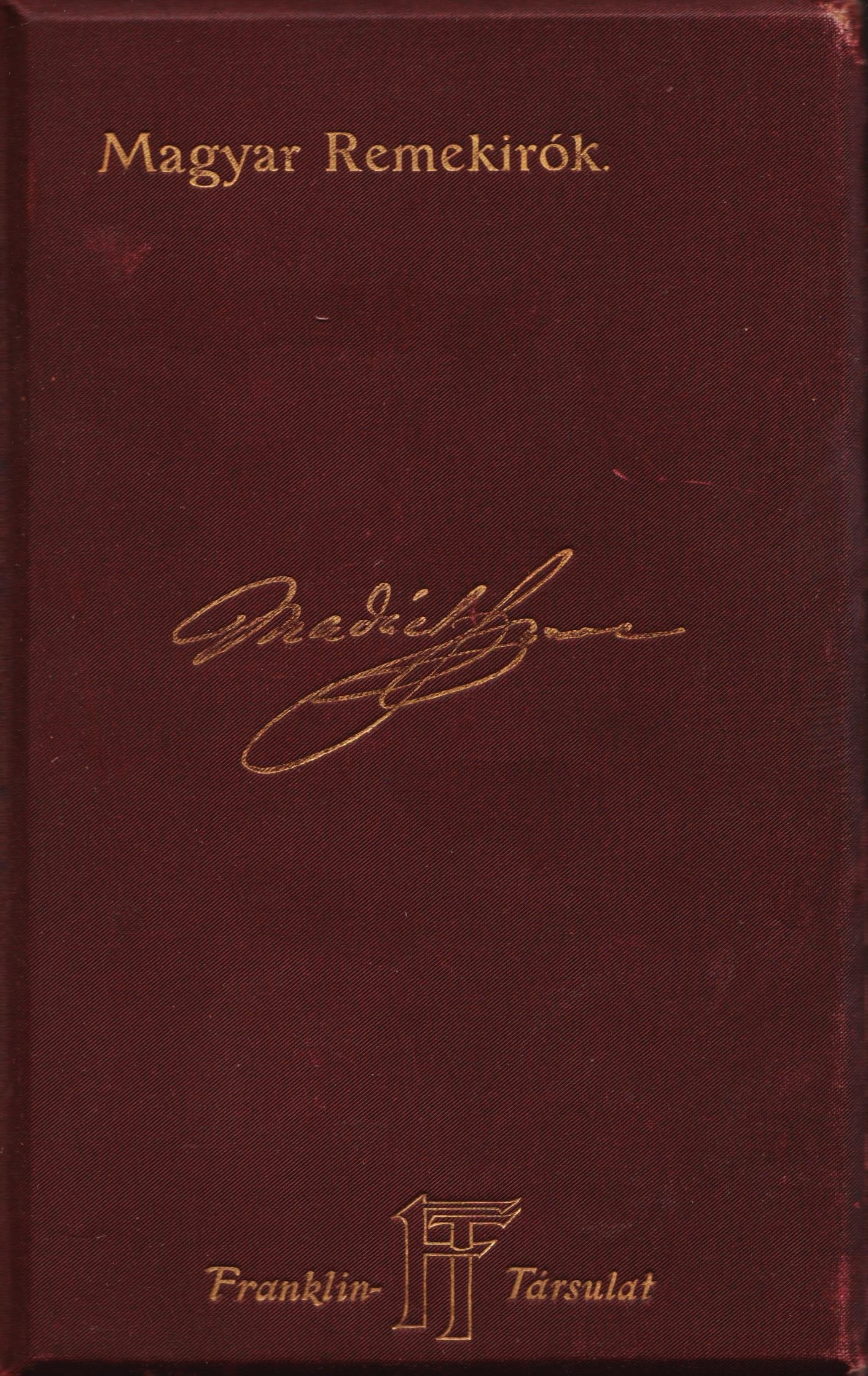 Madách Imre munkái (Magyar remekírók sorozat)